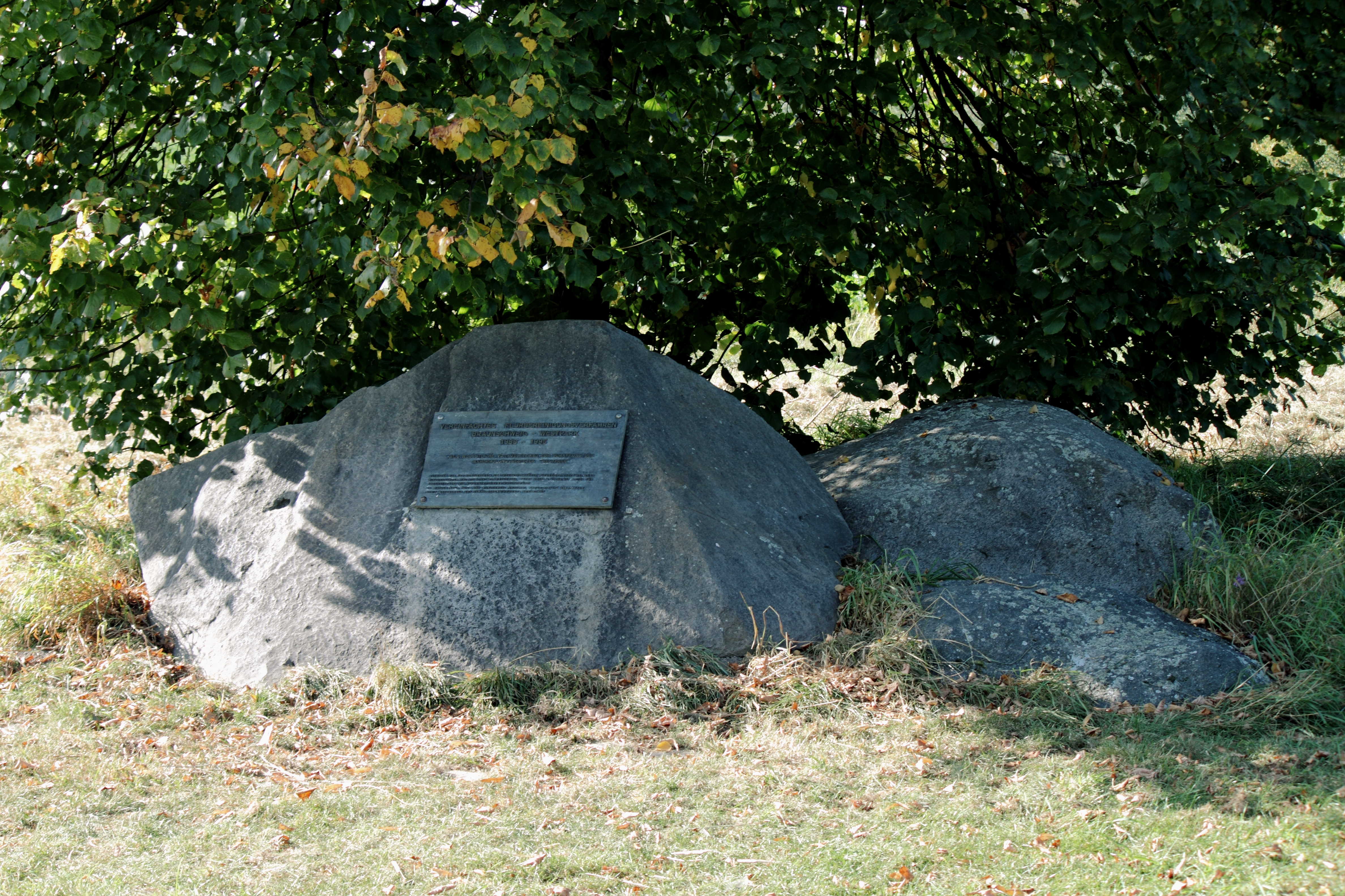 Braunschweig Westpark (nähe Madammenweg): Diese Steine sollen an die erschließung des Westparks mithilfe des vereinfachten Flurbereinigungsverfahren erinnern.